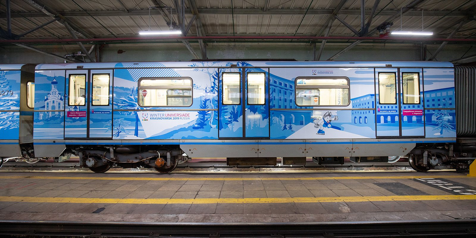 Именной электропоезд метро «Универсиада-2019» типа 81-740/741 в депо. Вид сбоку на половину вагона